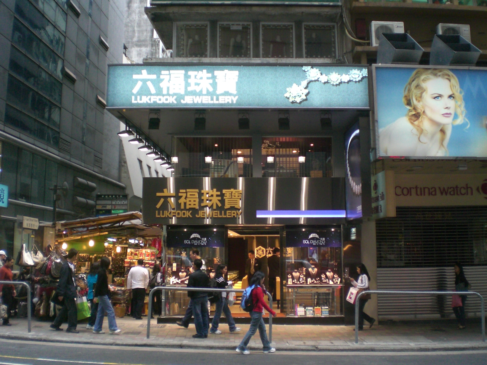 六福珠寶金行, 皇后大道中分行